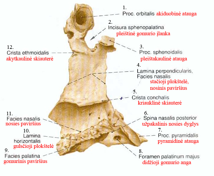 Veidinės dalies kaulas